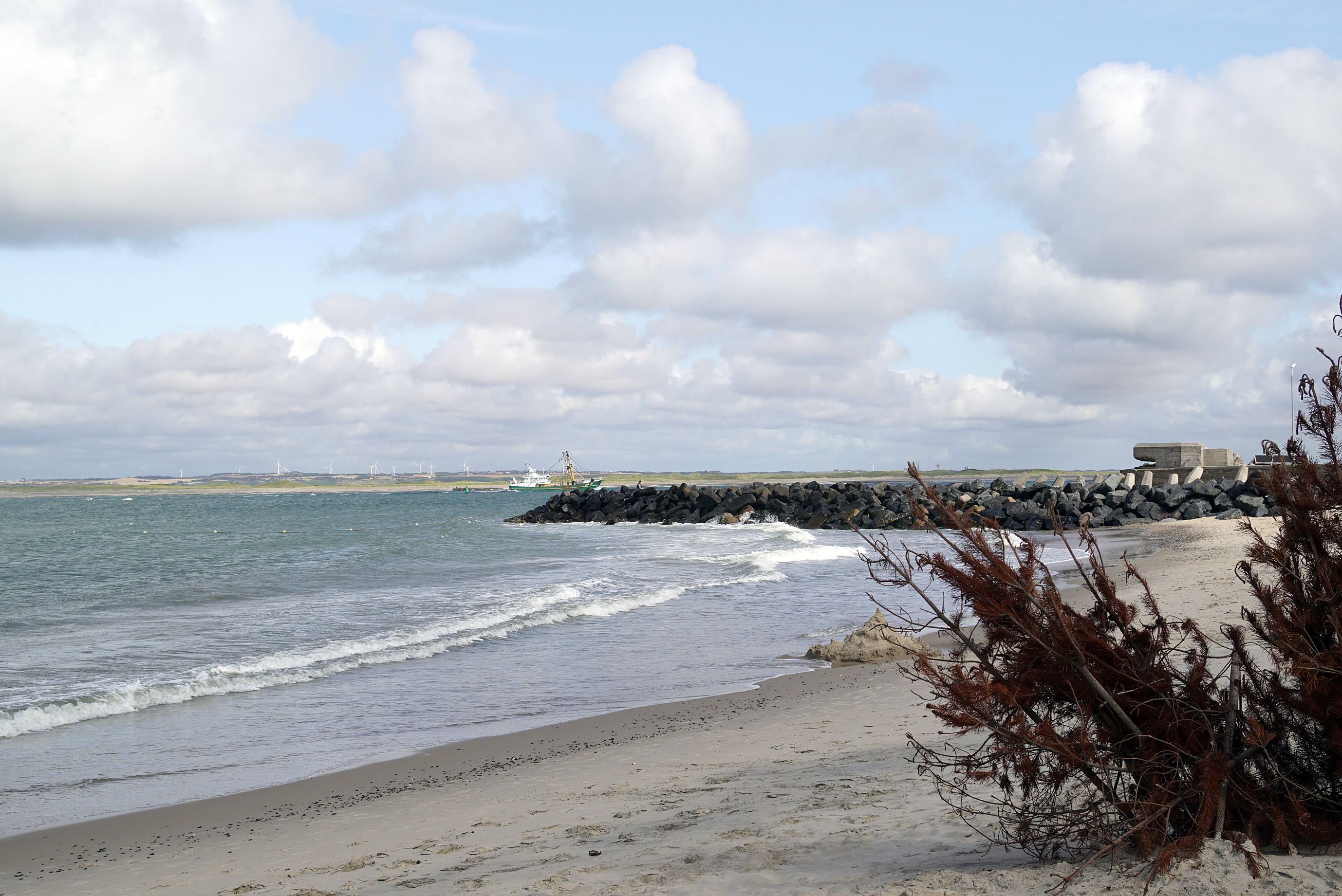 Thyborøn Kanal set mod nord